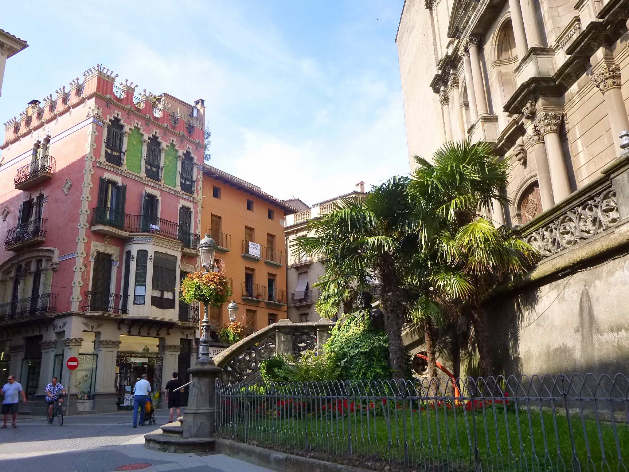 Iglesia de Sant Esteve (Olot)